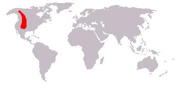 Bisonte americano